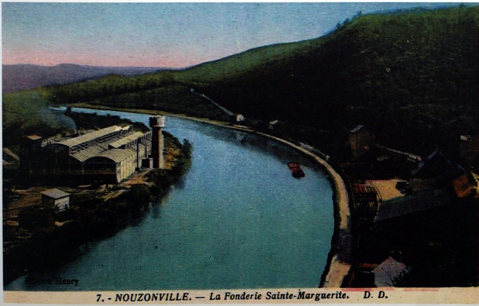 l'usine Thomé-genot anciennement ste-Marguerite.